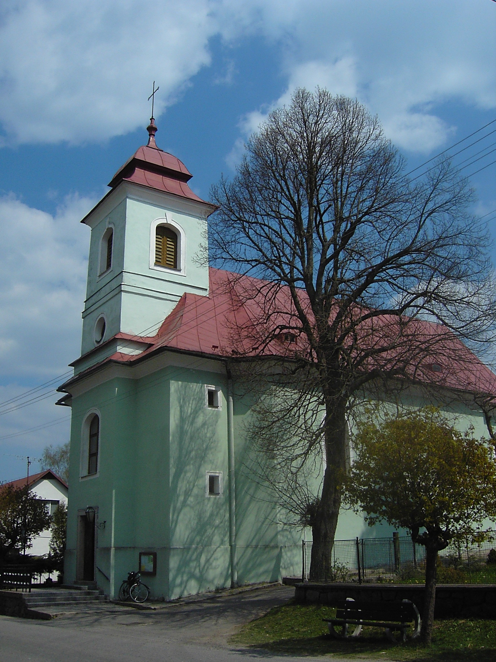 Frašavský kostel